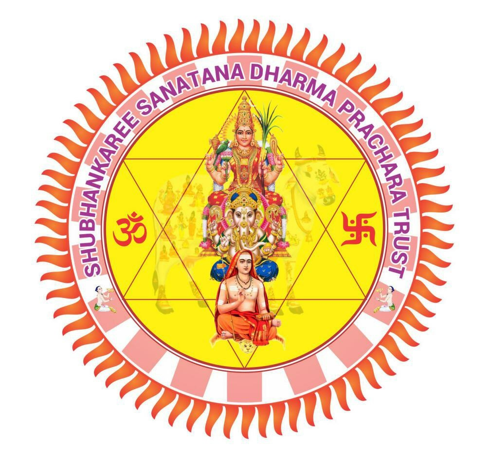 శుభంకరి సంస్థ యొక్క లోగో